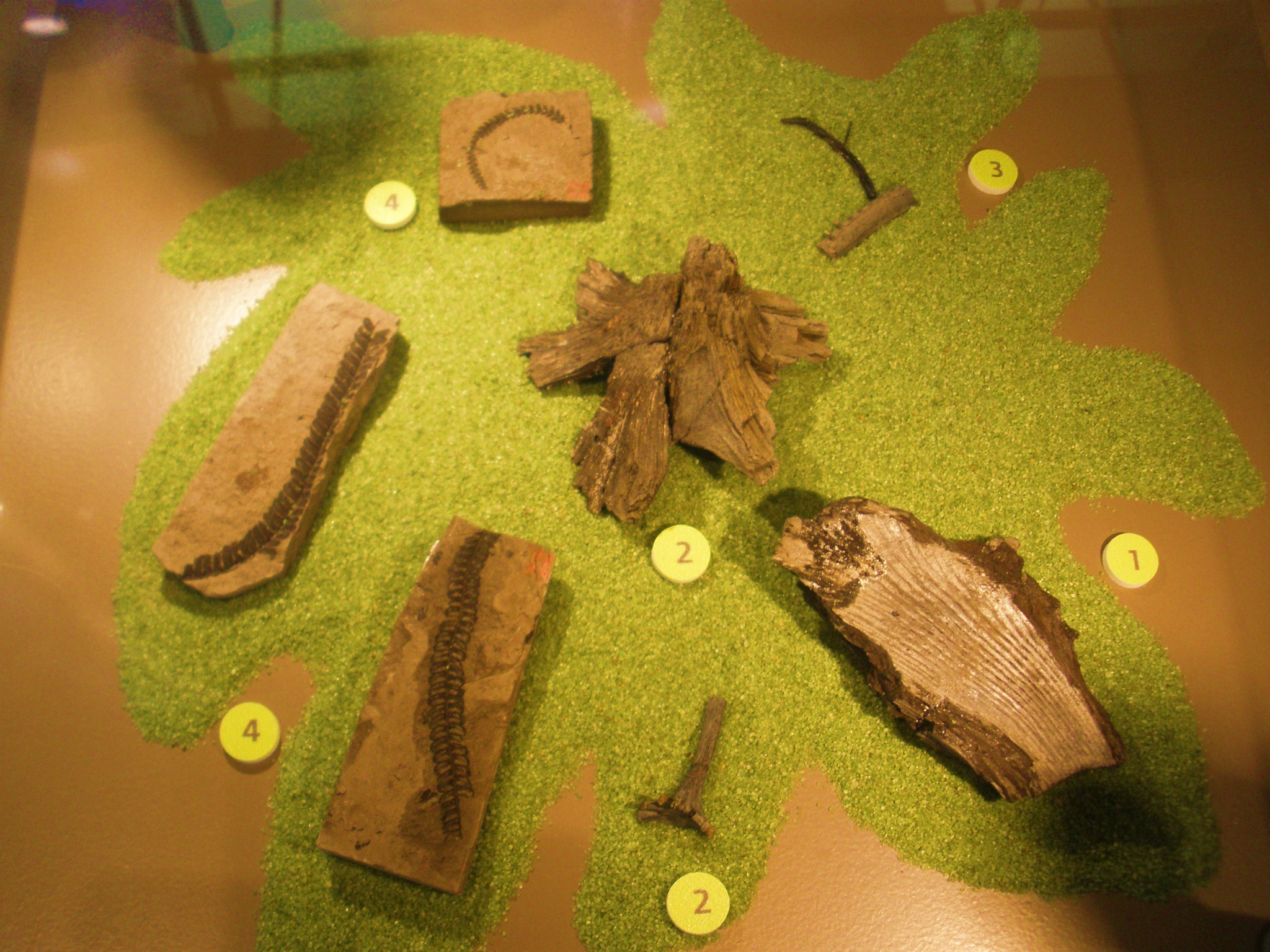 Fossil of Weichselia reticulata, an extinct plant Took the photo at Musee d'Histoire Naturelle, Brussels